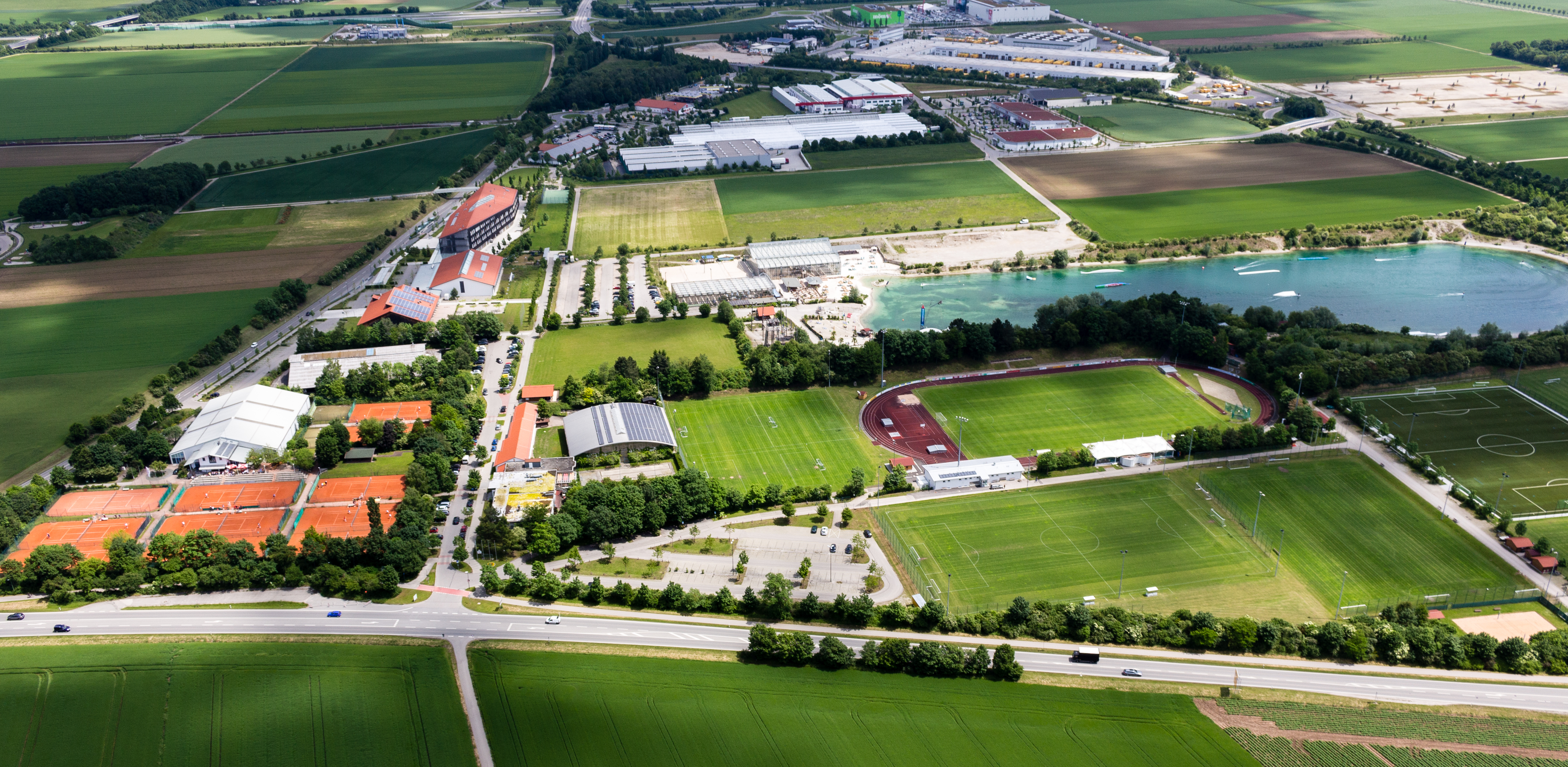 Sportpark Aschheim